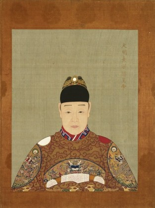 中文（中国大陆）: 作者已经去世超过200年，作品已经进入公有领域。